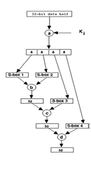 И это же от туда